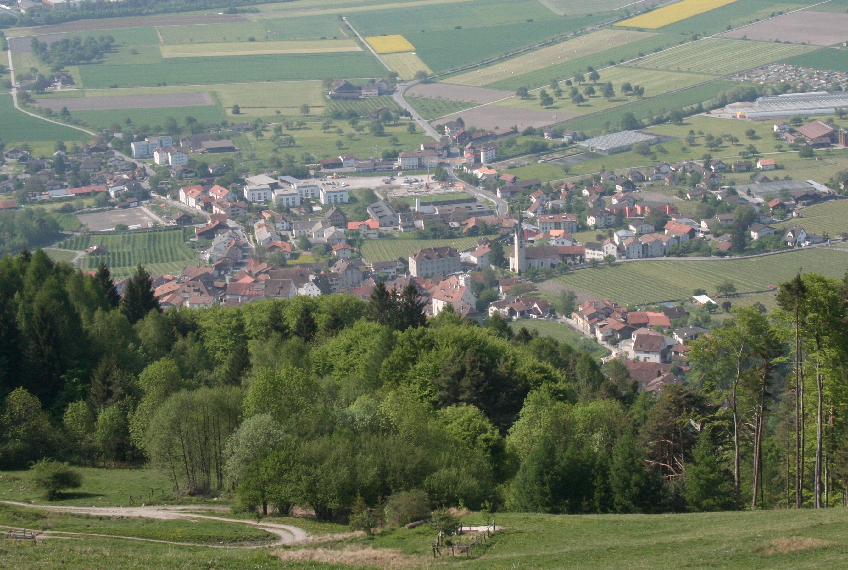 Blick auf Malans